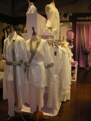 Фот ос выставки Pitti Immagine лето 2009